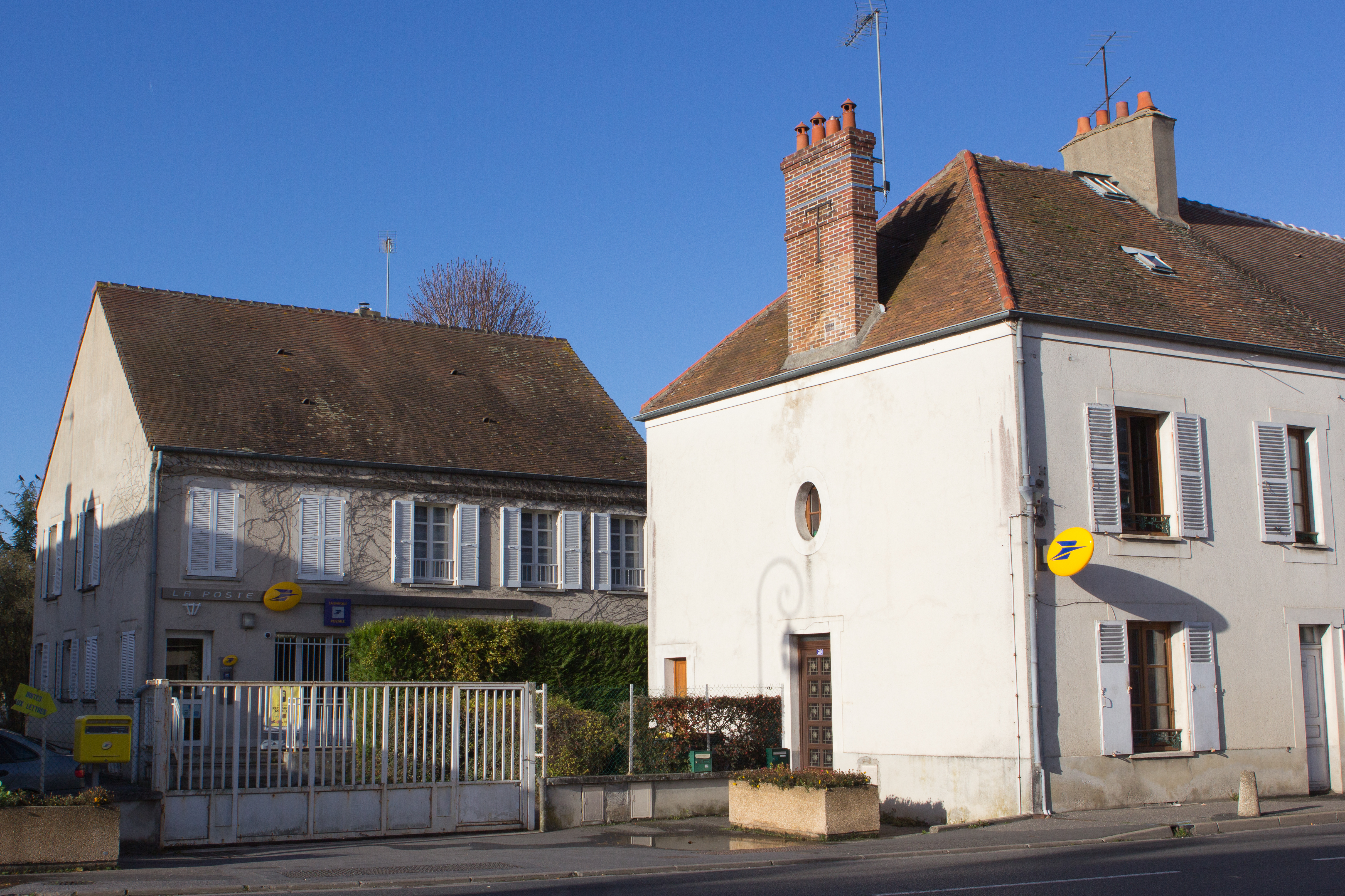 La poste de Perthes-en-Gatinais, Perthes, Seine-et-Marne, France.